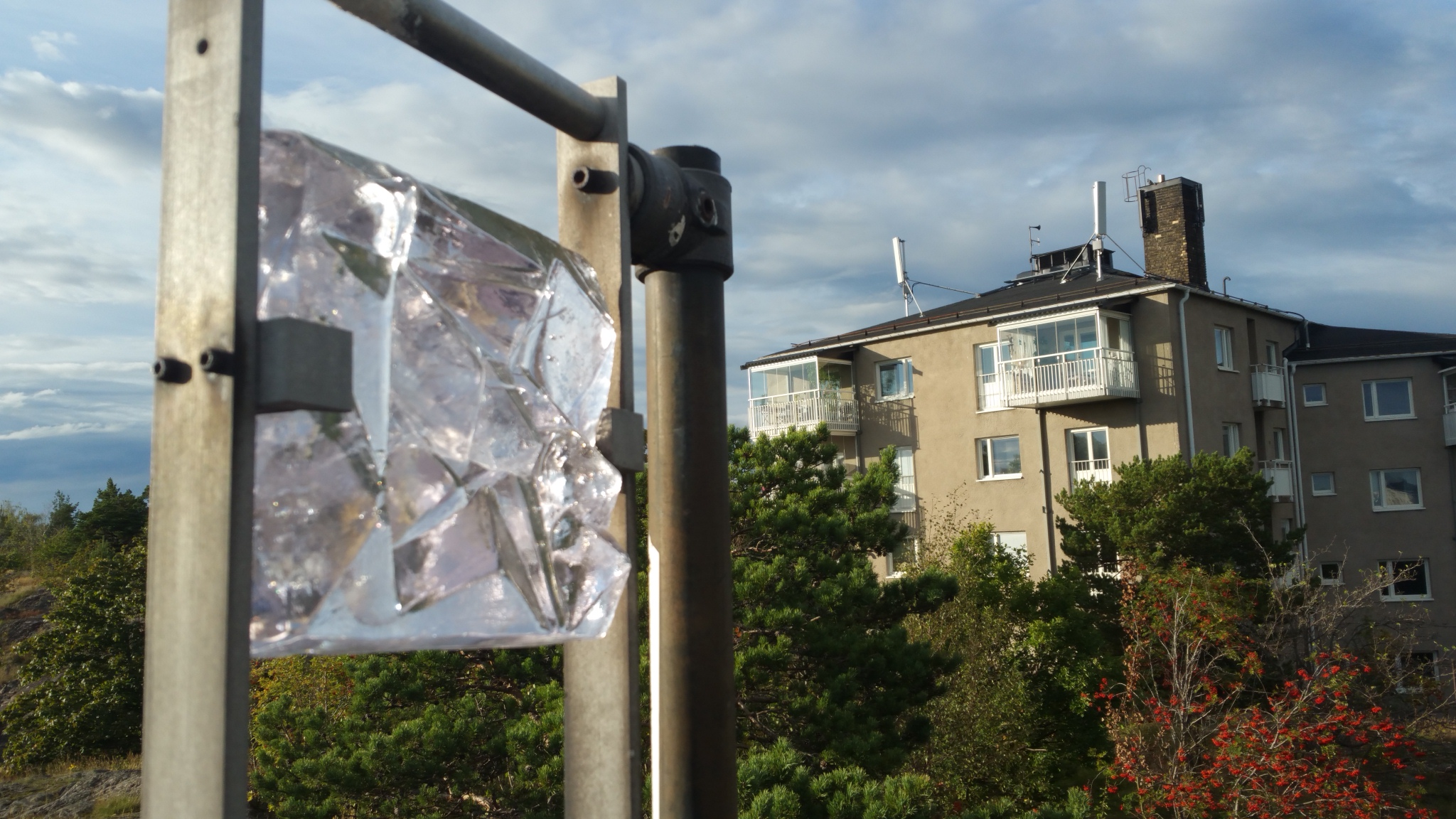 Fotografen Gustaf Mandahls installation i metall och glas på Skatberget, västra Finnberget i Nacka